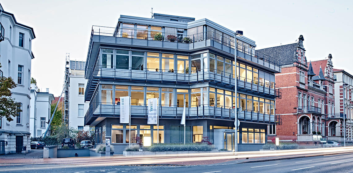 Gerschau.Kroth.Werbeagentur. Gebäude